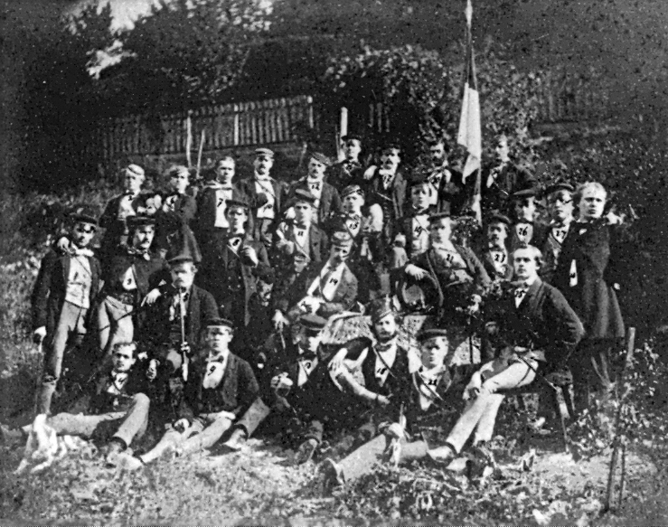 Das Corps Franconia (Salzpapierabzug)